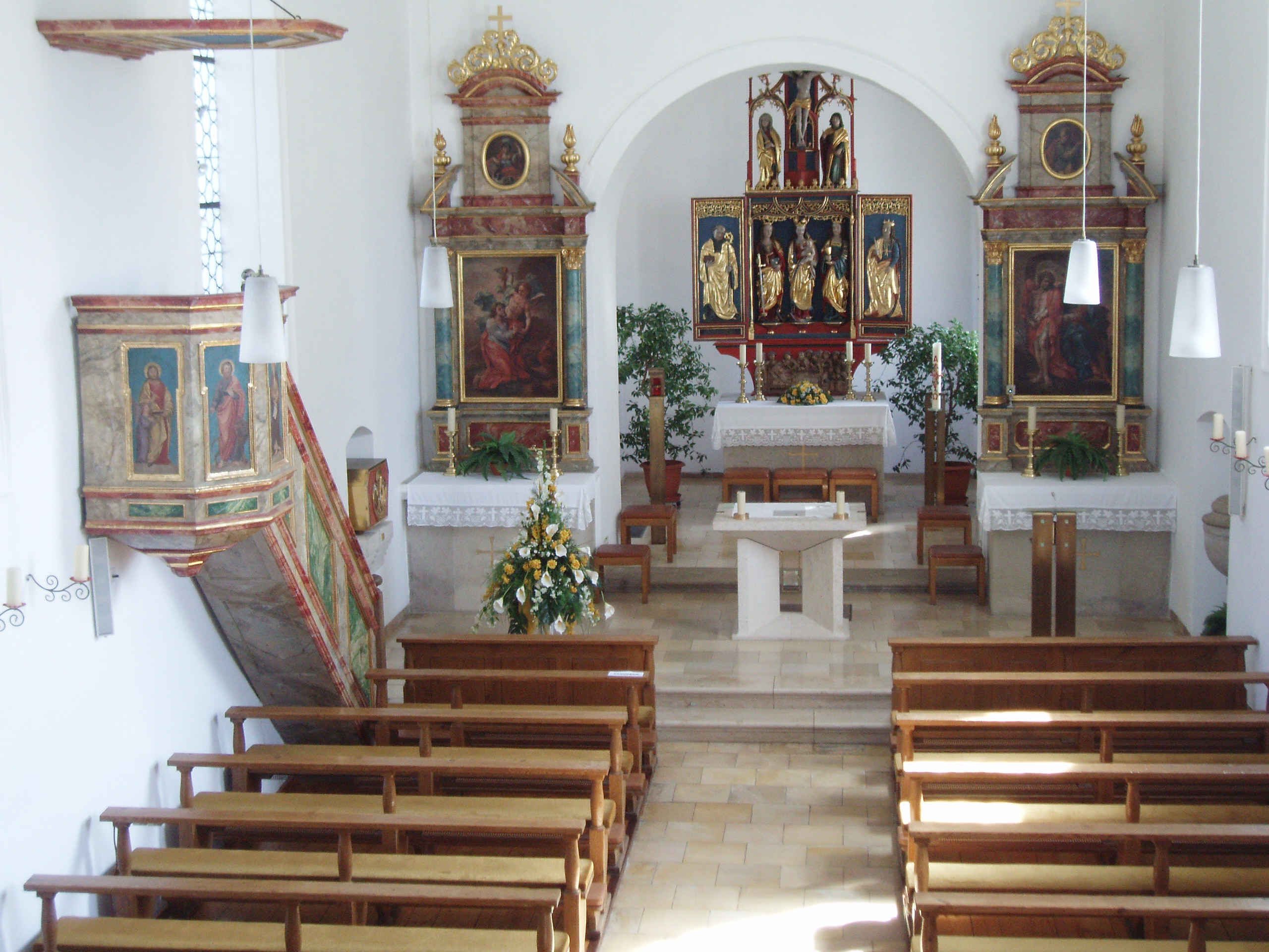 Inneres_der_Wehrkirche_von_Preith_im_Landkreis_Eichstätt